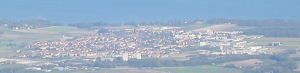 Gland (Vaud) vu de La Barillette ; auteur : Utilisateur:Marc Mongenet date : fr:13 septembre fr:2004